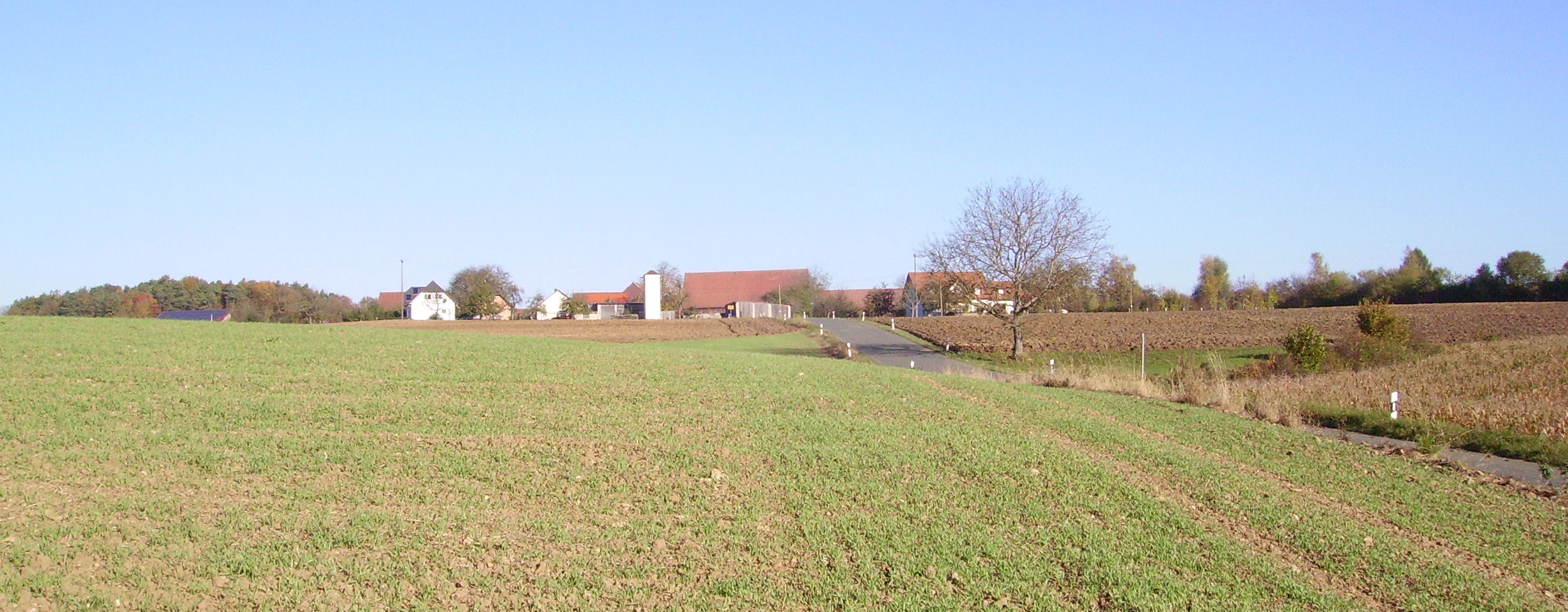 view of Siegritz, part of Heiligenstadt in Oberfranken in Upper Franconia, Germany